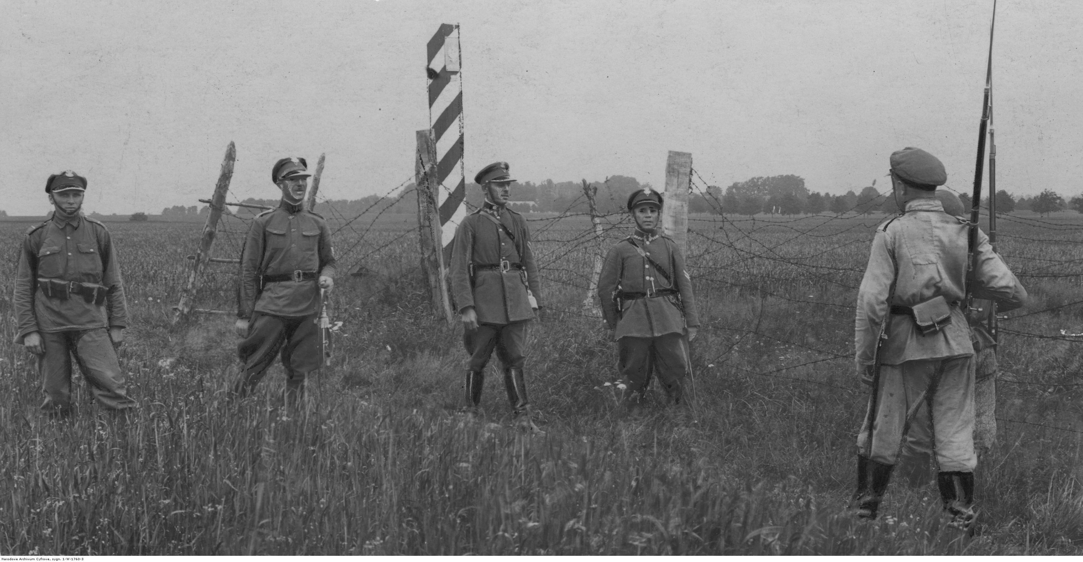 Żołnierze KOP-u na granicy polsko-radzieckiej, podczas spotkania z patrolem sowieckim. Koncern Ilustrowany Kurier Codzienny - Archiwum Ilustracji. Sygnatura: 1-W-1760-3